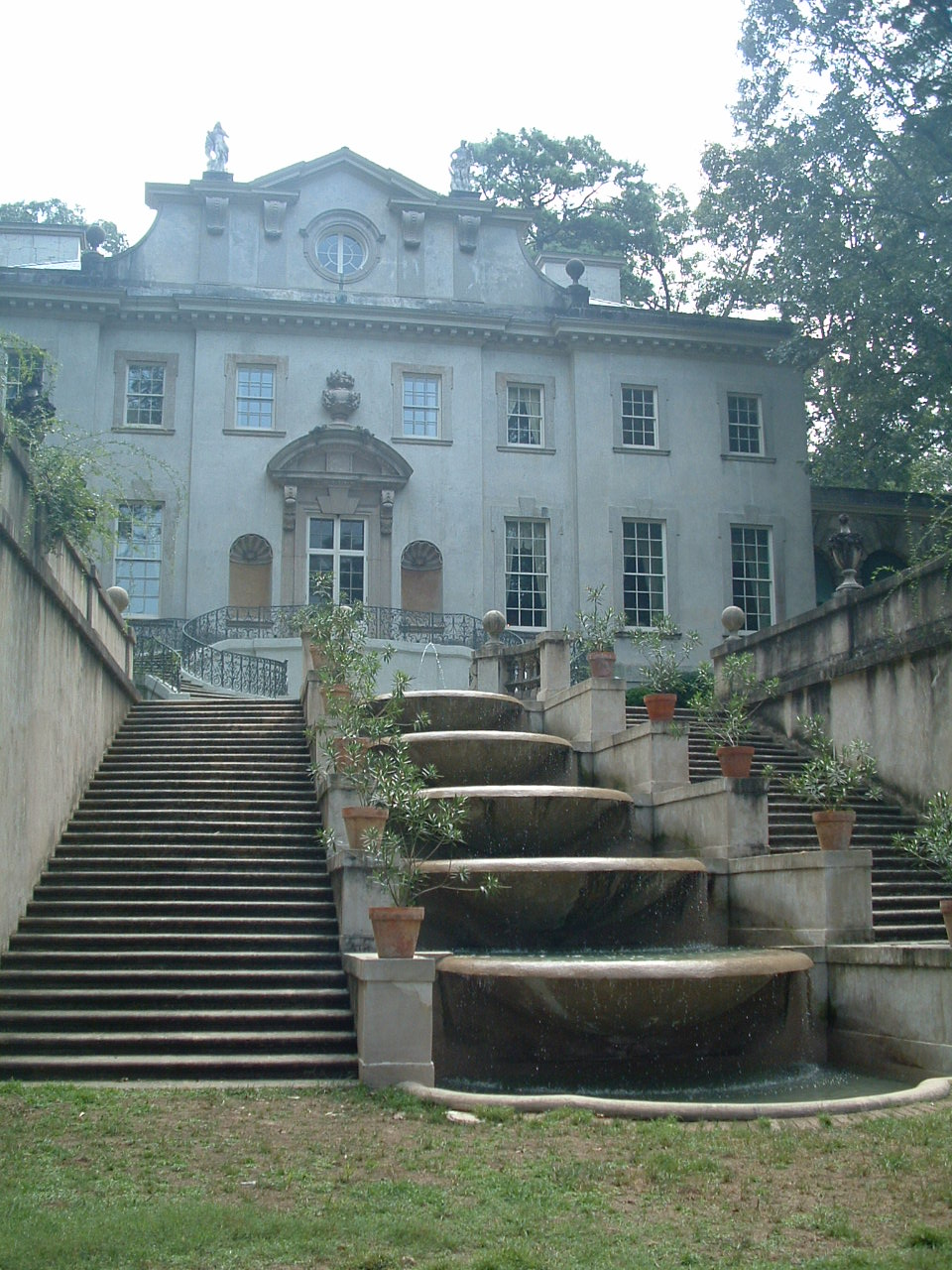 Swan House garden elevation